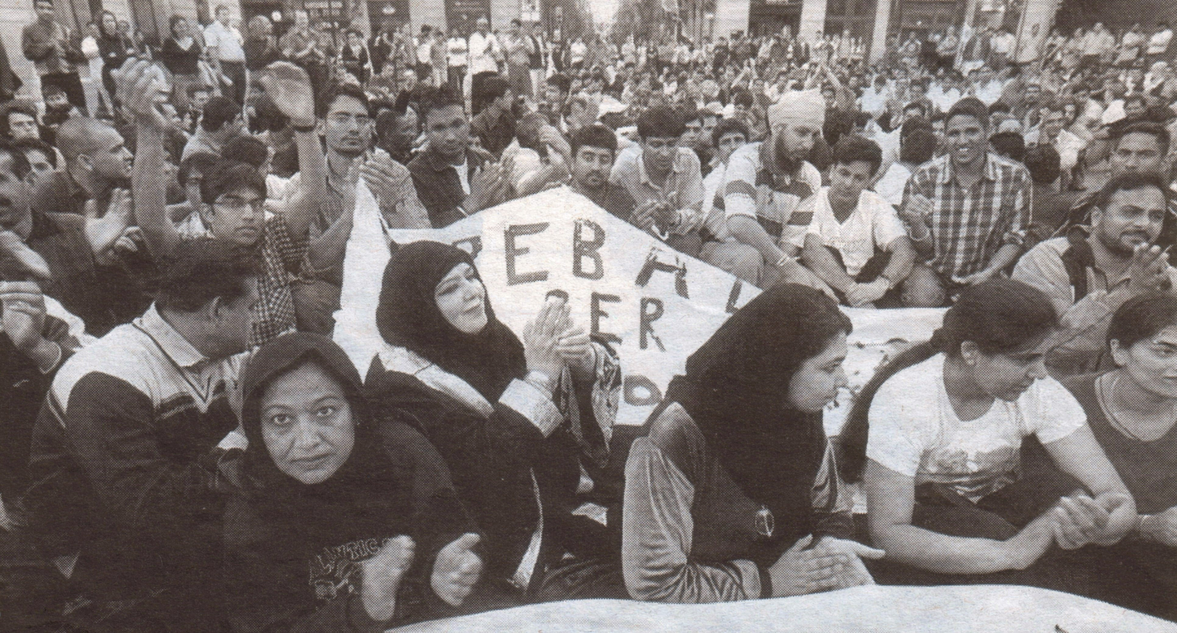 dones i homes del paquistan duarnt la vaga